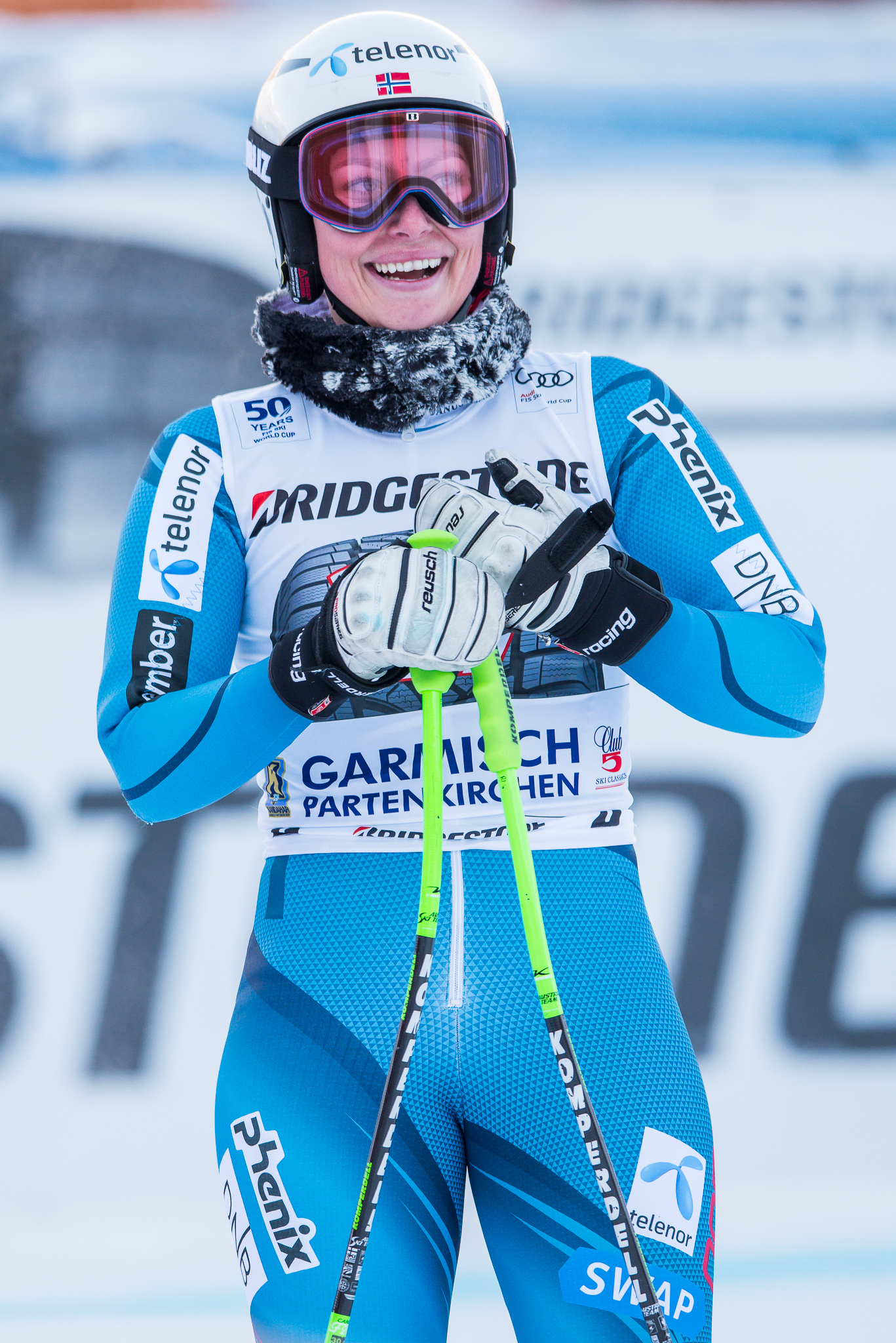 64. Kandahar Rennen,Audi FIS Ski Weltcup Garmisch-Partenkirchen,Damen Abfahrt,Kandahar,Ladies Downhill,Ragnhild Mowinckel